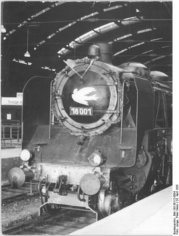 Dampflok 18 001 (BR 18) Zentralbild Junge 24.4.1955 Mit D 71 kamen die Unterschriften der Dresdener Eisenbahner. Das Lok-Personal des D 71, der eine halbe Stunde nach Beginn der Unterschriftensammlung zum Wiener Appell des Weltfriedensrates Dresden verließ, brachte aus Dresden bereits die Unterschriften von 128 Eisenbahnern des Dresdener Hauptbahnhofs nach Berlin. Die Eisenbahner haben als erste ihr Unterschriften zum Wiener Appell gegeben. Gleichzeitig überbrachte das Lokpersonal eine Grußadresse an den Weltfriedensrat, welche die Cottbuser Eisenbahner dem D 71 mitgegeben hatten. UBz: Der D 71 fährt in den Berliner Ostbahnhof ein.